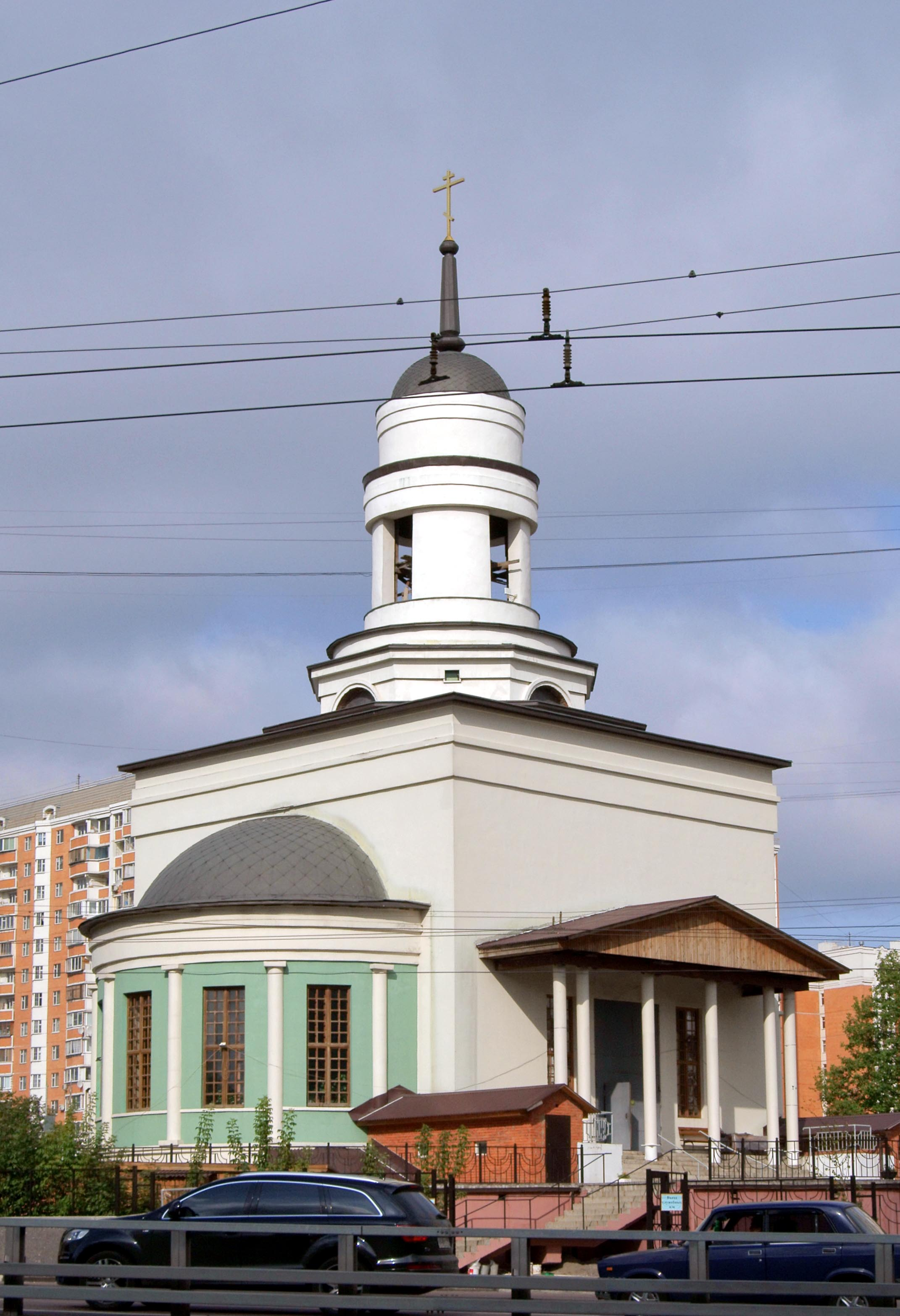 Храм святителя Иннокентия, митрополита Московского в Бескудникове (Москва, Дмитровское ш., влад. 66). Характерная для "Московского барокко" конструкция "восьмерик на четверике".